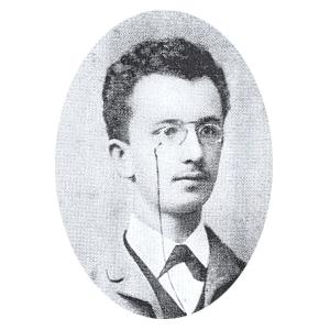 Karl Ludwig Hoschna (1877-1911), Americký hudební skladatel a hobojista českého původu .